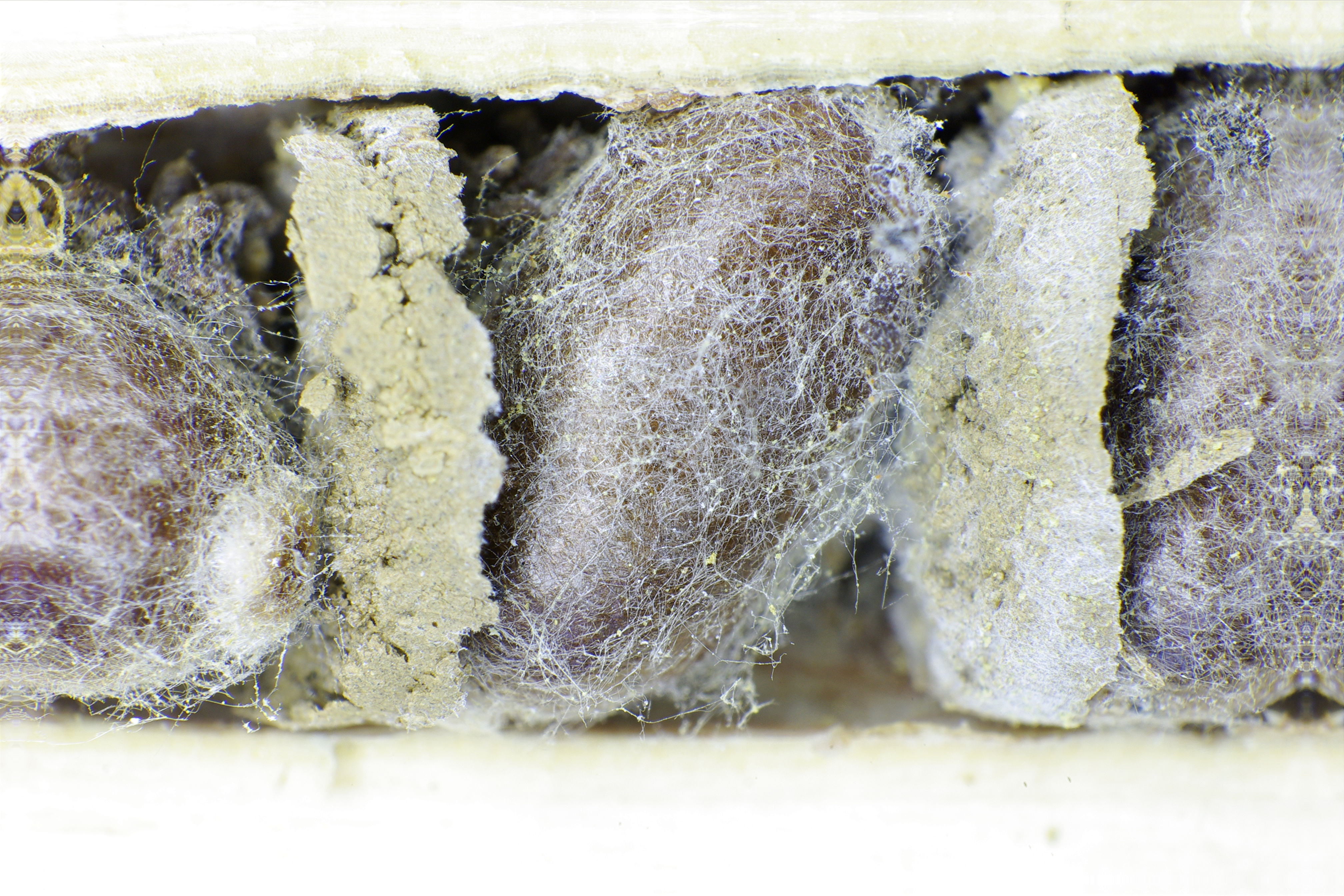 Kokon mit Puppe von Osmia rufa